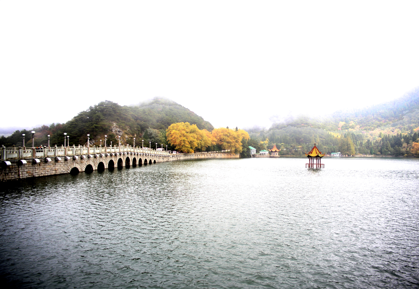 庐山芦林湖